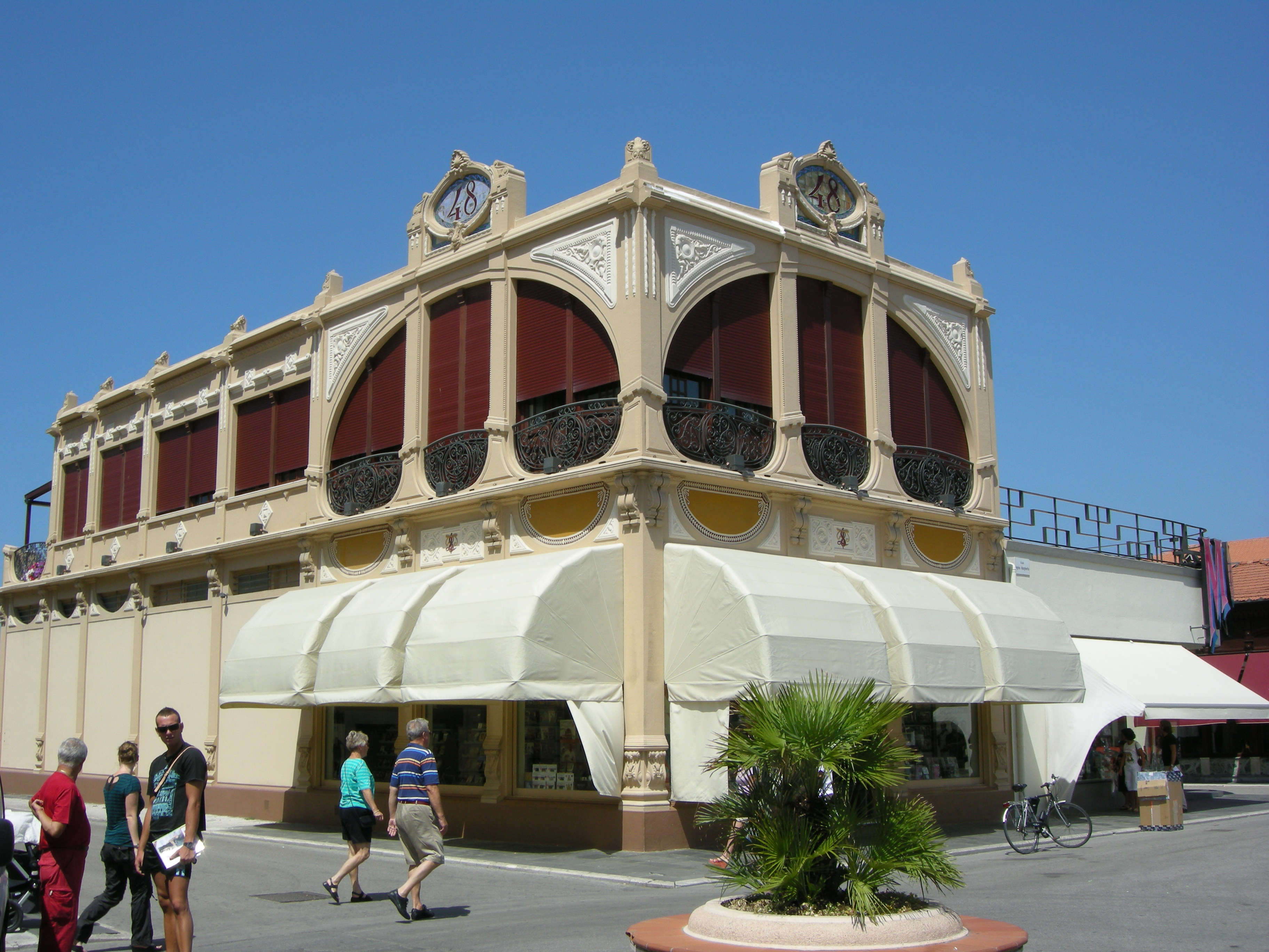 Passeggiata di viareggio, viale regina margharitha 25, Magazzini Duilio 48